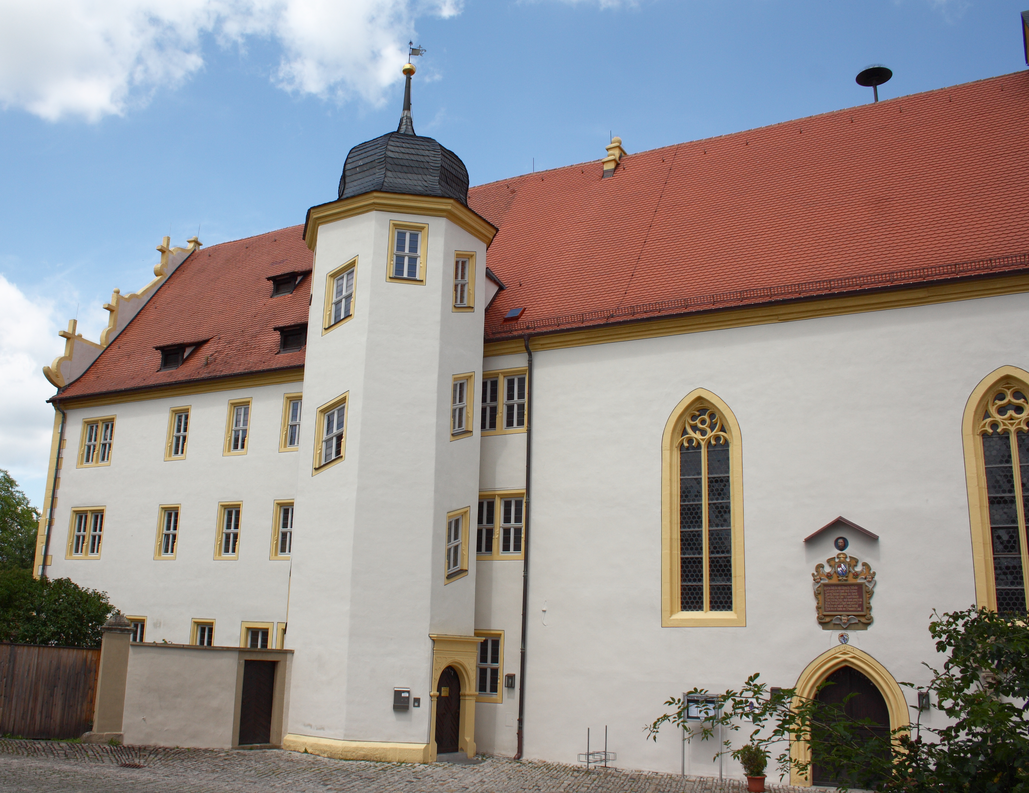 Spitalkirche St. Johann Baptist in Iphofen im Landkreis Kitzingen (Bayern)